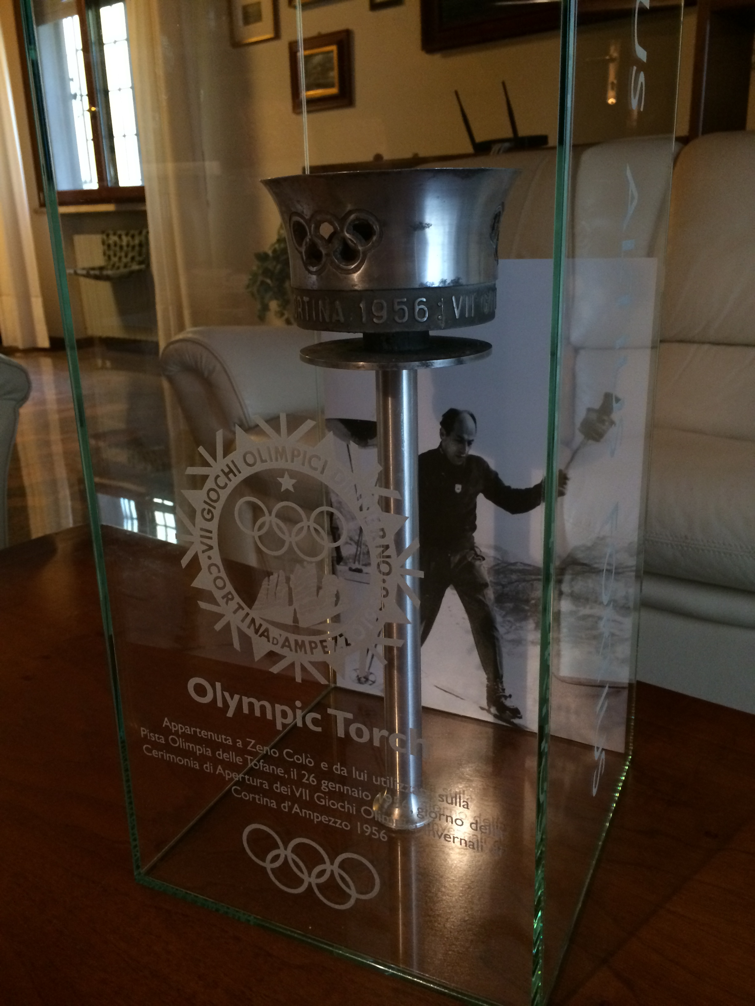 Torcia Olimpica Cortina d'Ampezzo1956, appartenuta ed utilizzata dal Campione Olimpico Zeno Colò sulla Pista Olimpia delle Tofane il 26 gennaio 1956, giorno della cerimonia di apertura dei VII Giochi Olimpici Invernali, collezione Fabio Ferrari (Spilamberto MO)